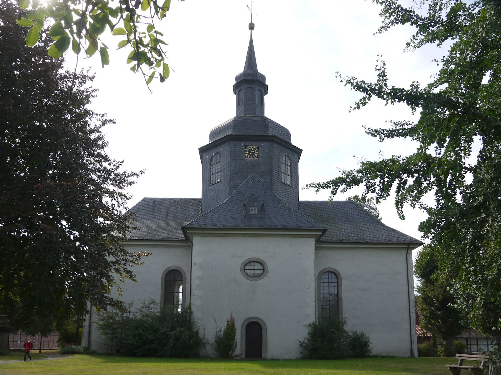 Schlosskirche (ev.) in Salzgitter-Salder - Ansicht von Norden